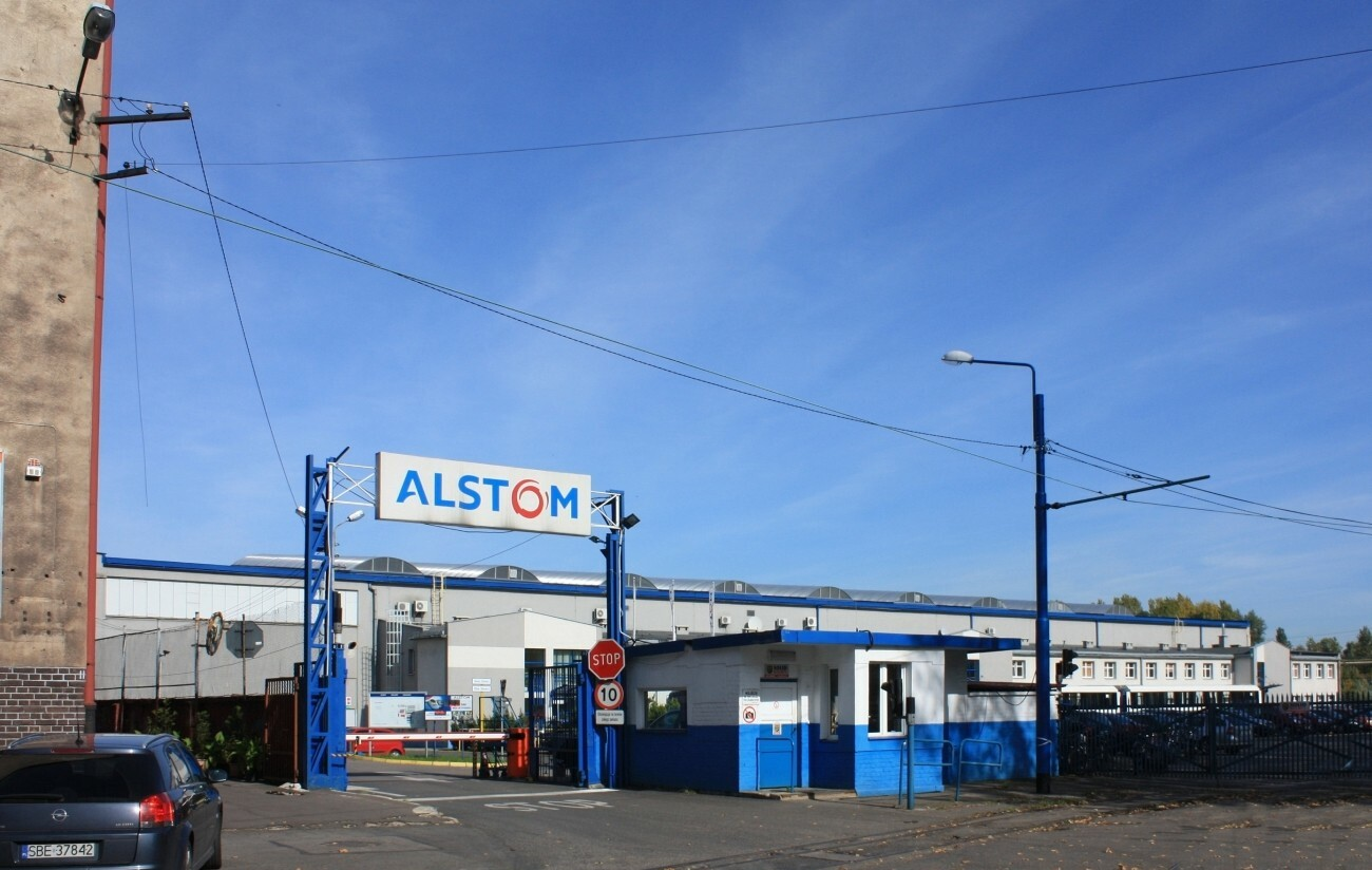 Brama wjazdowa na teren zakładów Alstom Konstal w Chorzowie.